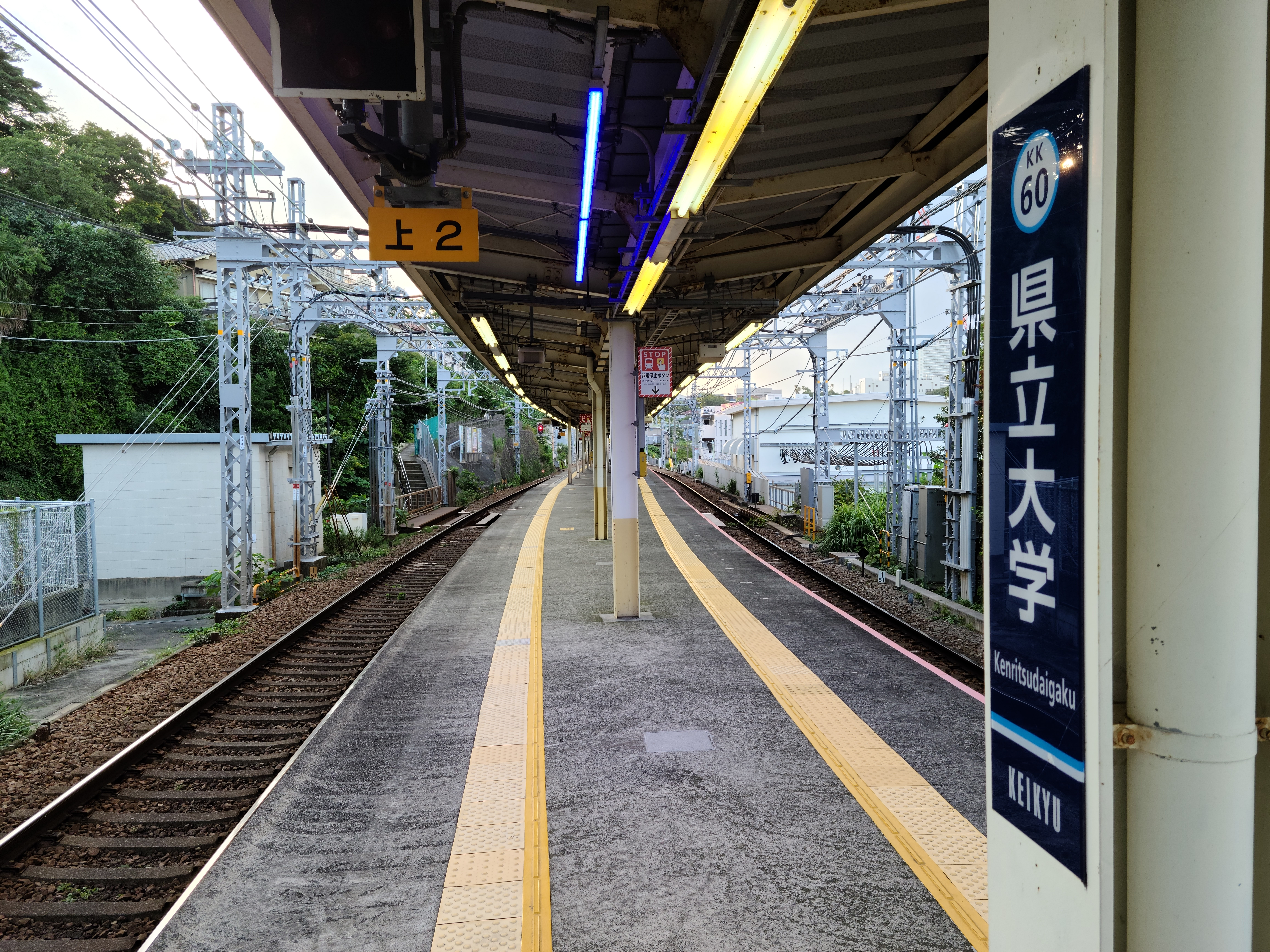 県立大学駅のホームです。